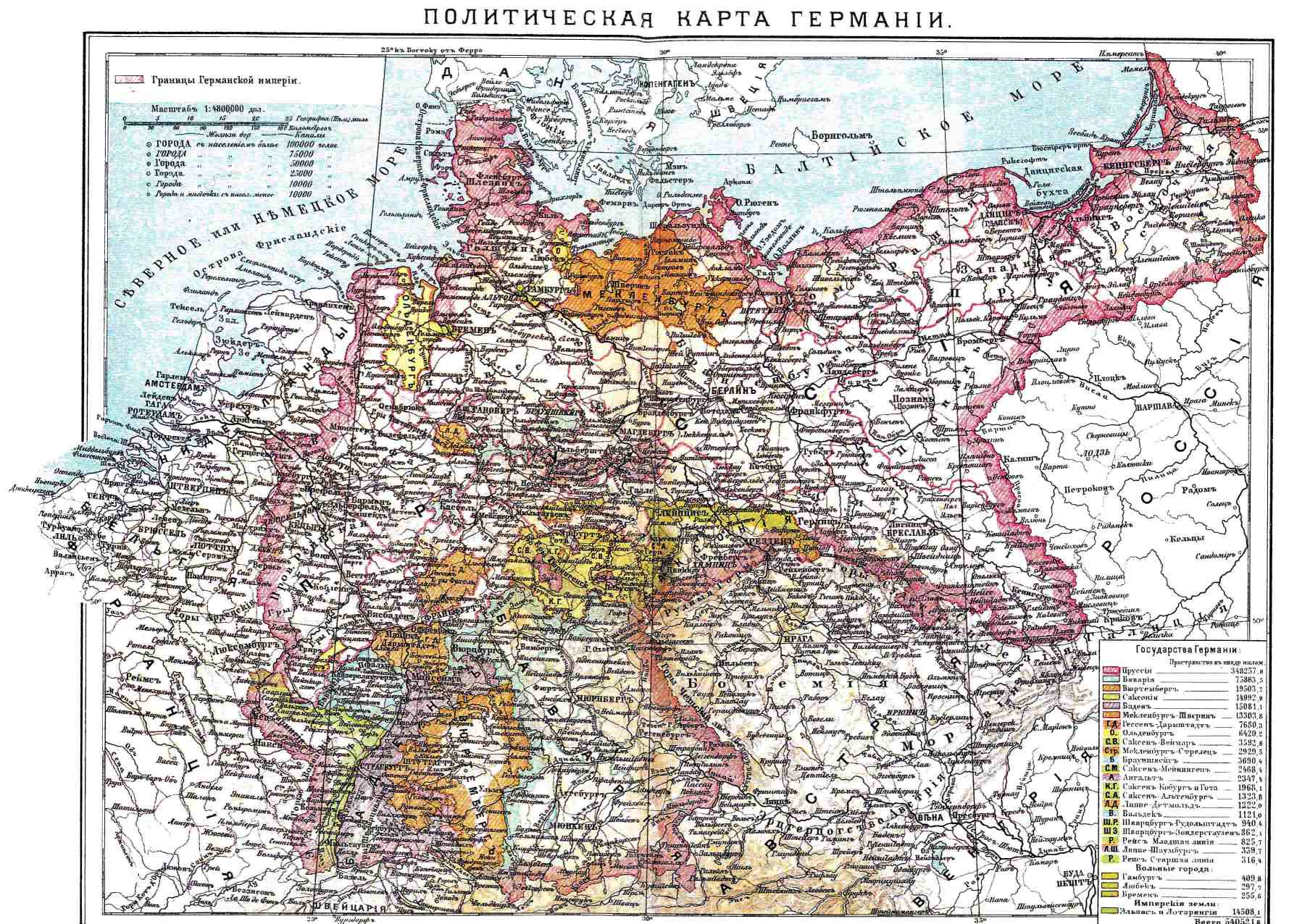 Карта Германии из энциклопедии Брокгауза и Ефрона